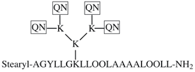 PepFect15. QN – trifluorometüülkinoliini jäägid